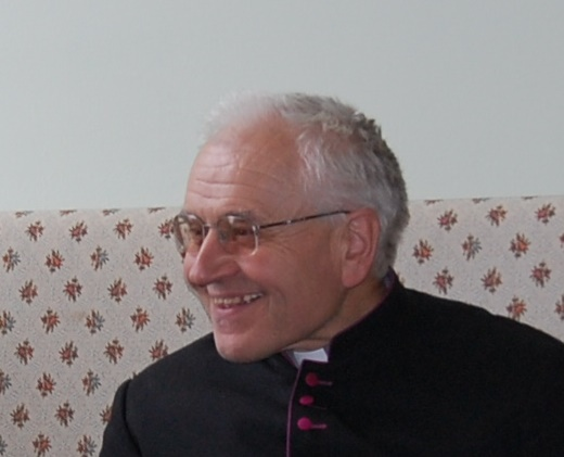 Jan Peňáz (2012)